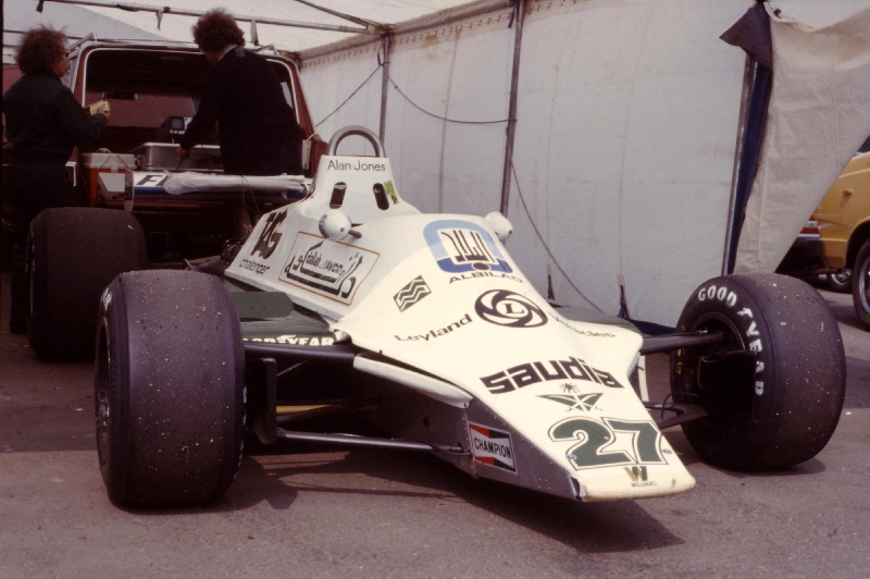 Williams-Ford d'Alan Jones aux essais du GP de F1 à Zolder (Belgique) 1980